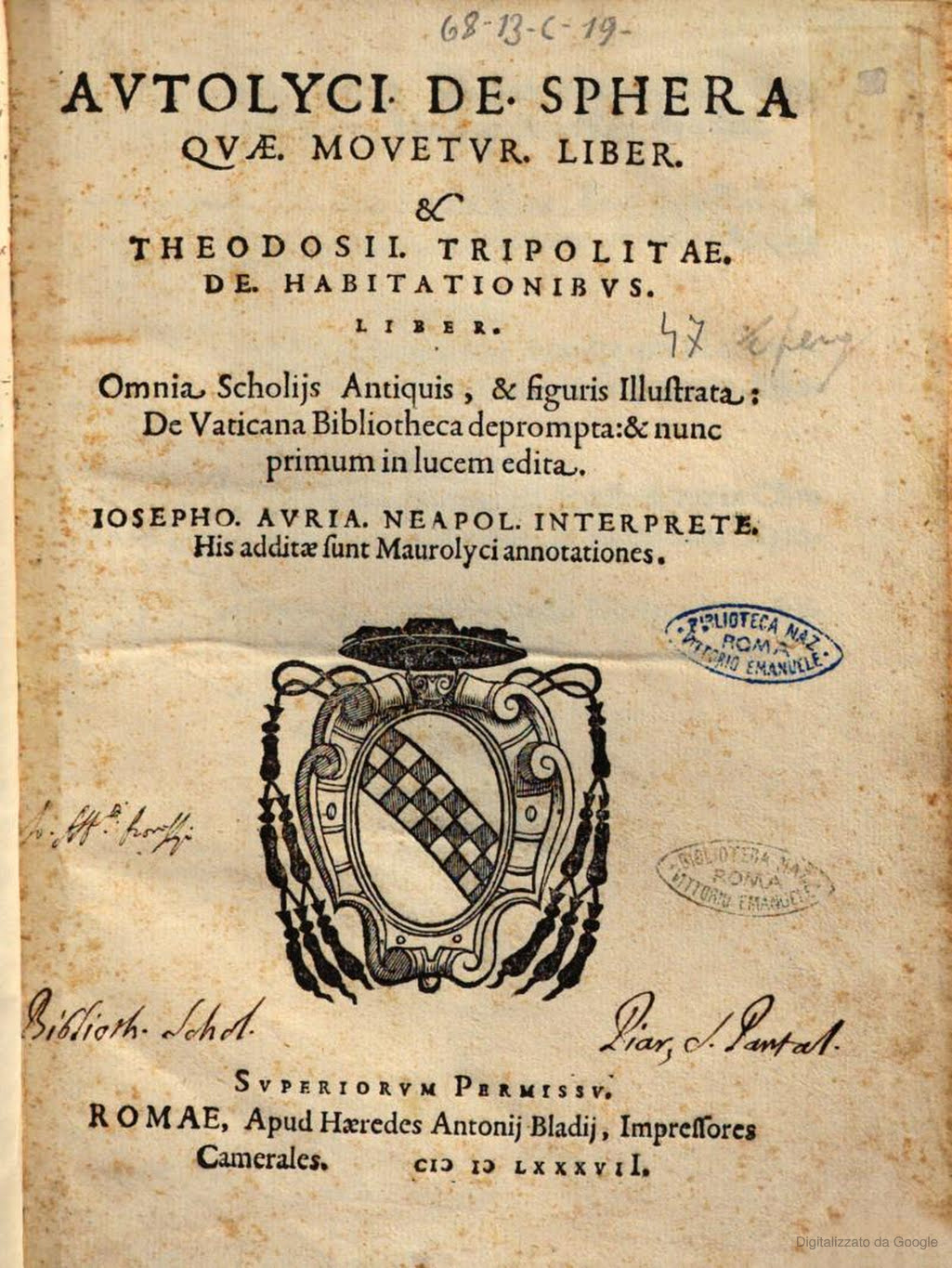 Autolyci De sphera quae mouetur liber, Romae : apud haeredes Antonij Bladij, impressores camerales, 1587